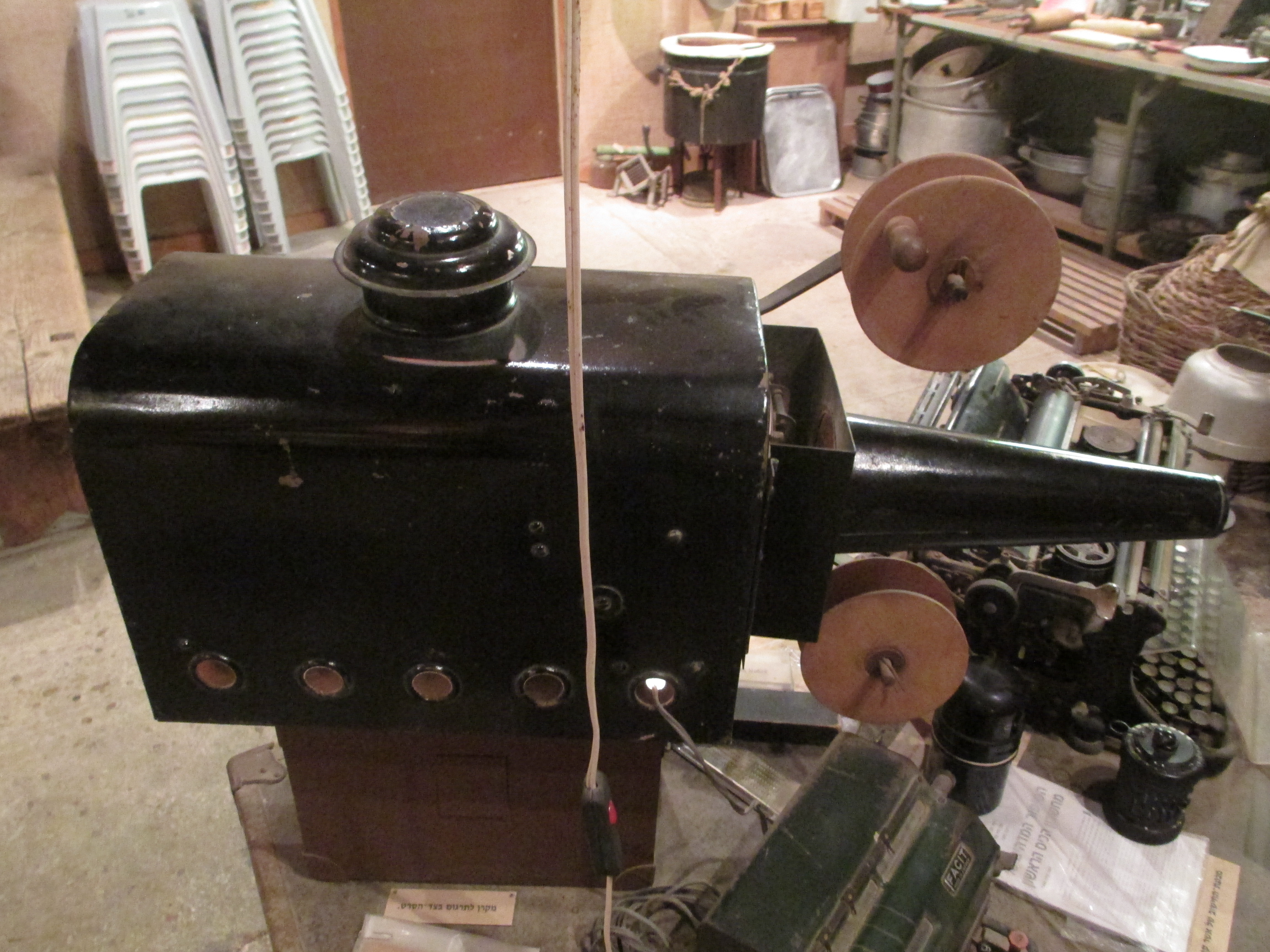 מוזיאון מזרע הקטנה. מקרן להקרנת תרגום סרטים